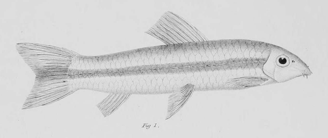 Garra malabarica = Garra mullya